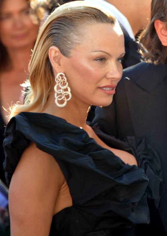 Pamela Anderson au festival de Cannes